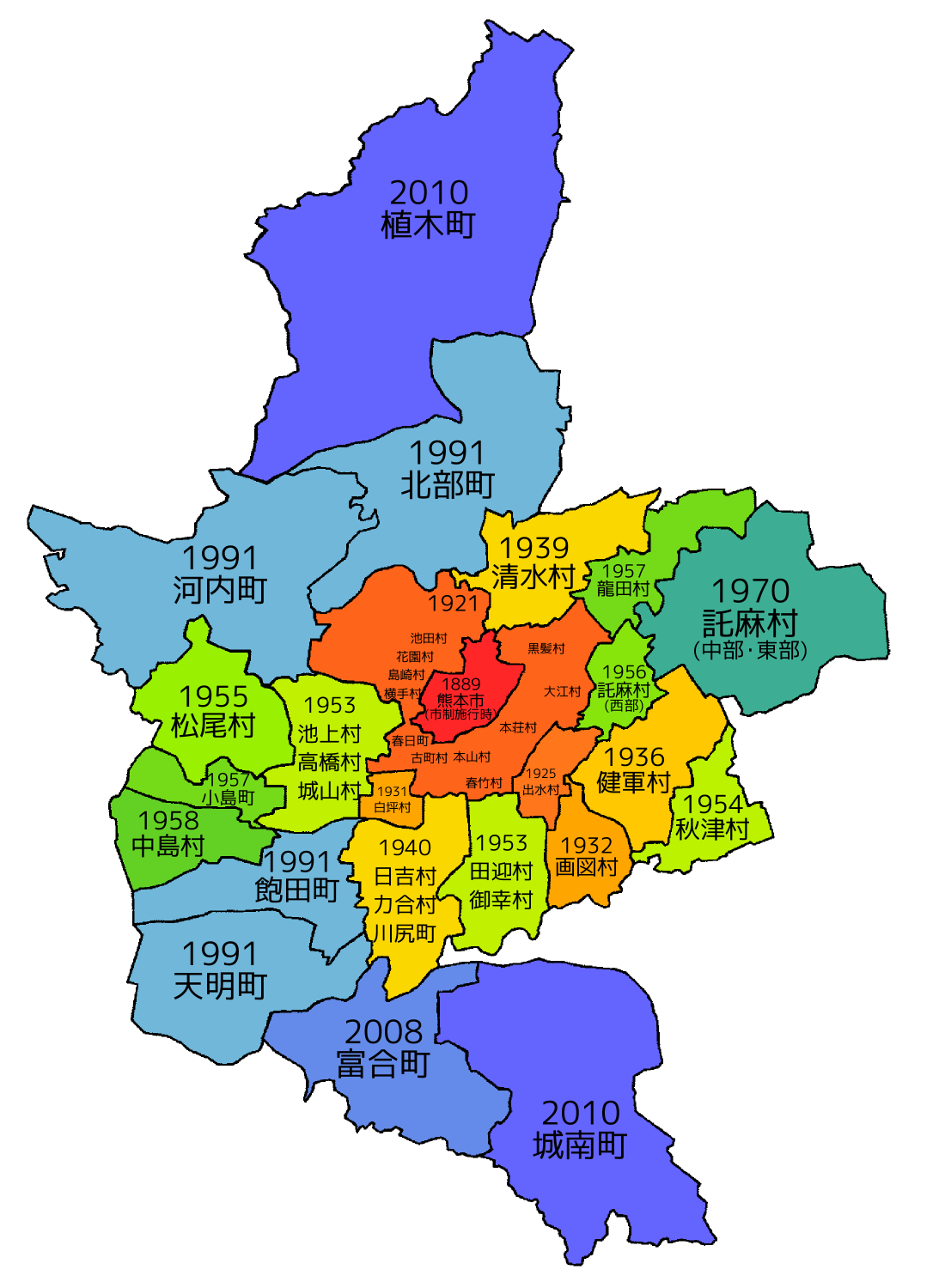 熊本市の市域の変遷。赤は明治の市制施行時、橙は大正に編入、黄は昭和(戦前)に編入、緑は昭和(戦後)に編入、青は平成に編入。